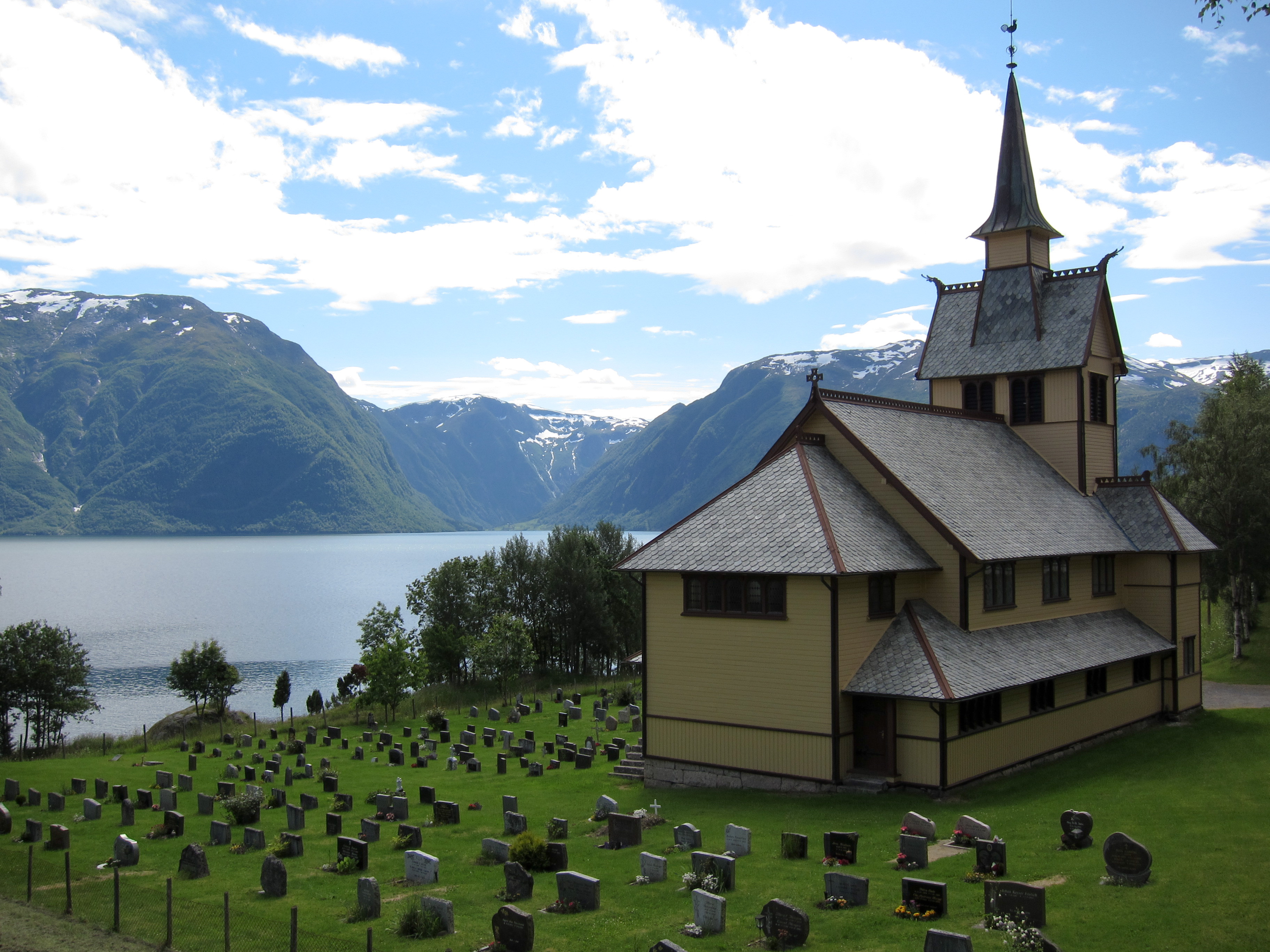 Sæle church